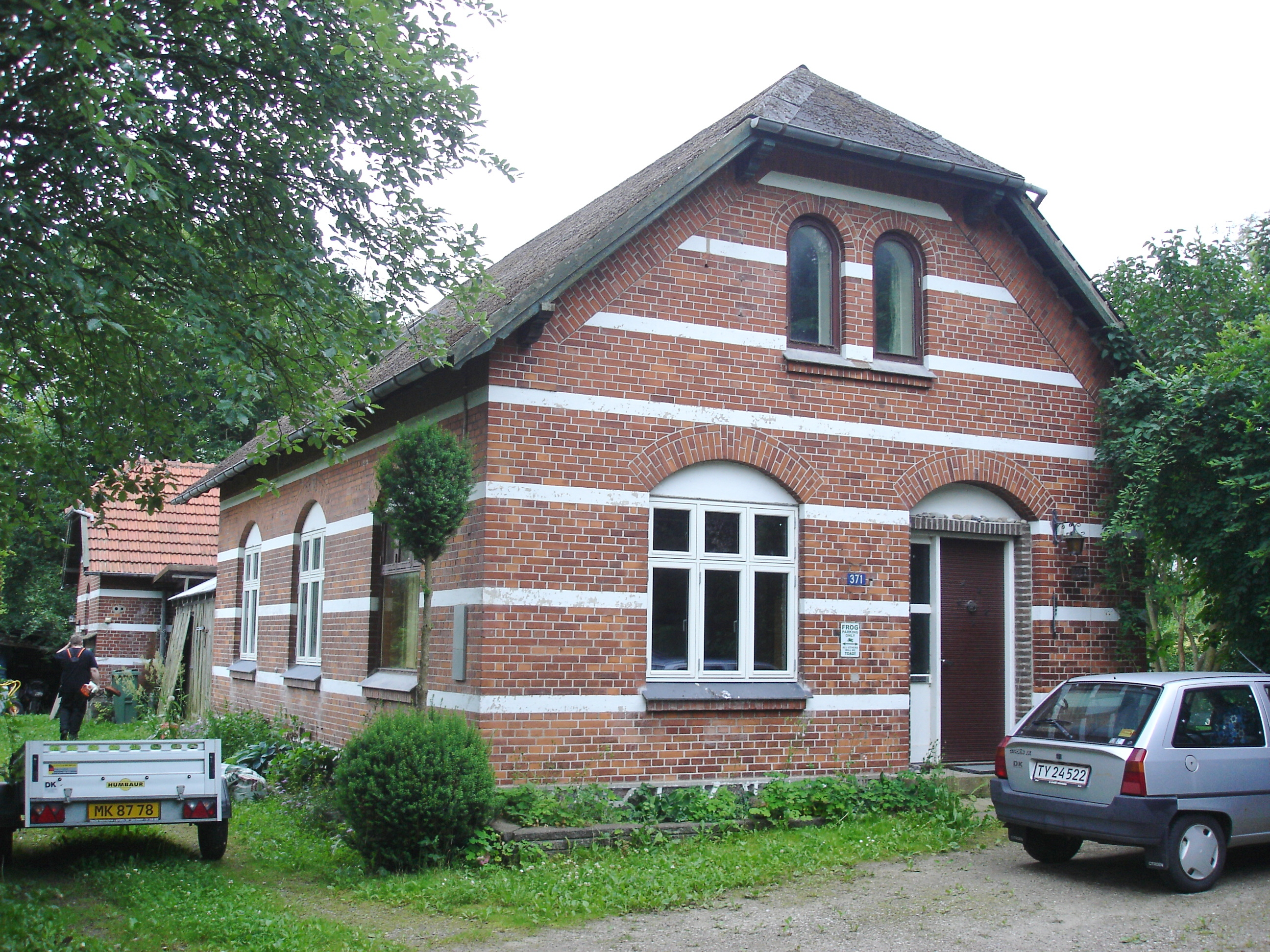 Stensgård Station fra vejsiden